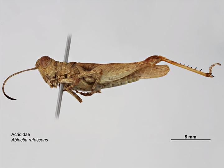 Ablectia rufescens male